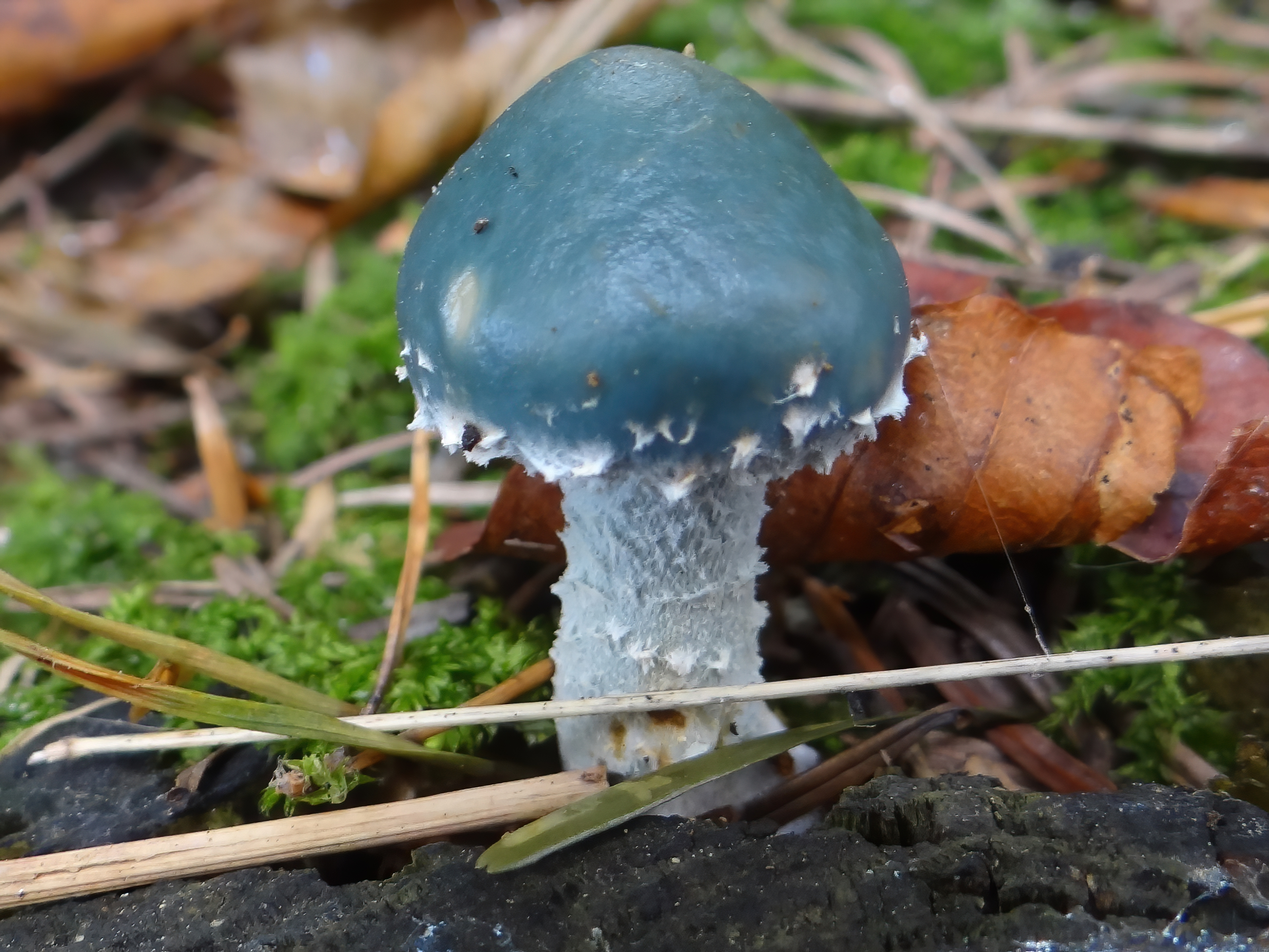 Stropharia caerulea (location: Poland, Jaworz (Beskid Wyspowy)